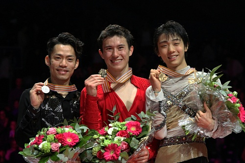 Подиум чемпионата мира по фигурному катанию 2012 в мужском одиночном катании. Дайсукэ Такахаси (2-е место), Патрик Чан (1-е место), Юдзуру Ханю (3-е место)